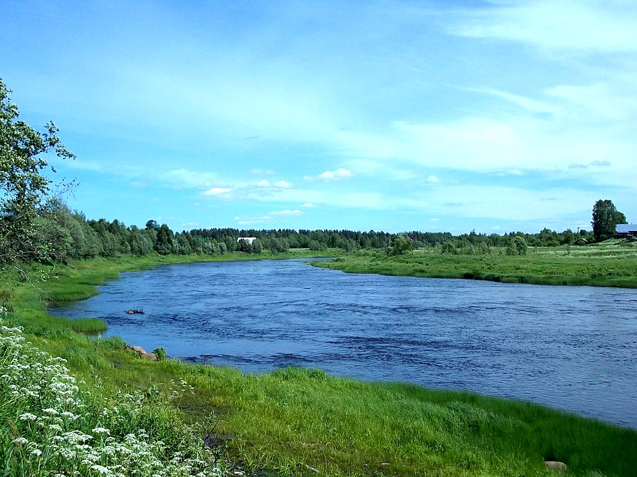 Река Важинка